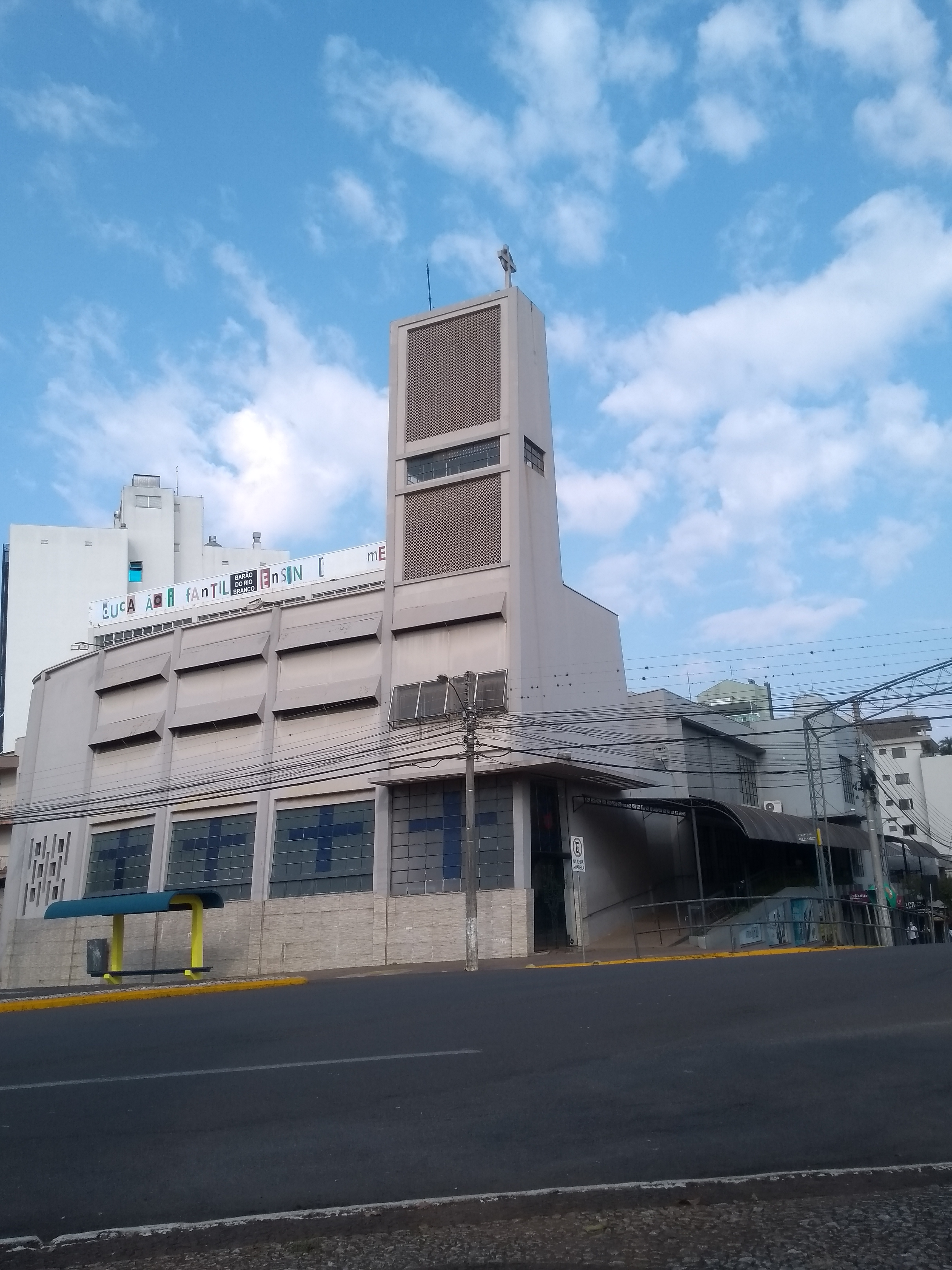 Fachada do Barão do Rio Branco, Erechim, Brasil